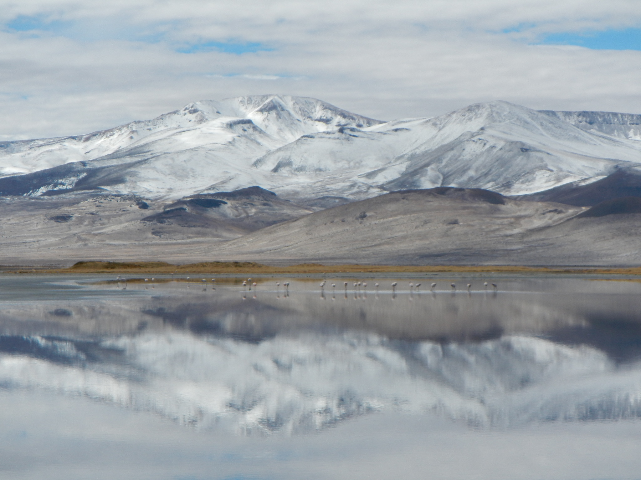 Paraje altiplánico que pareciese ser una pintura.